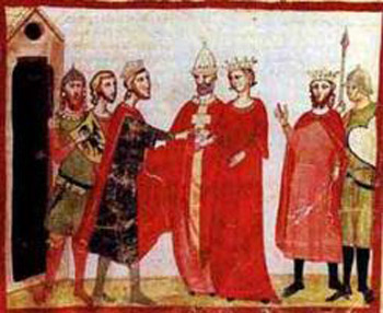 Svatba Jolandy Jeruzalémské a Fridricha II. Štaufského